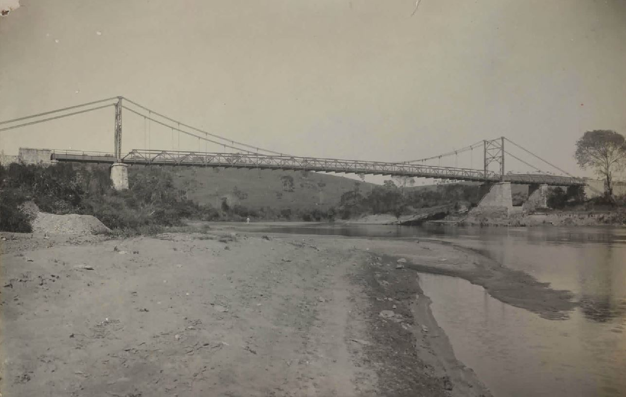 Fotografia disponível no Arquivo Público Mineiro, mostrando a ponte pênsil Afonso Pena sobre o rio Sapucaí entre Santa rita do Sapucaí e Turvolandia.